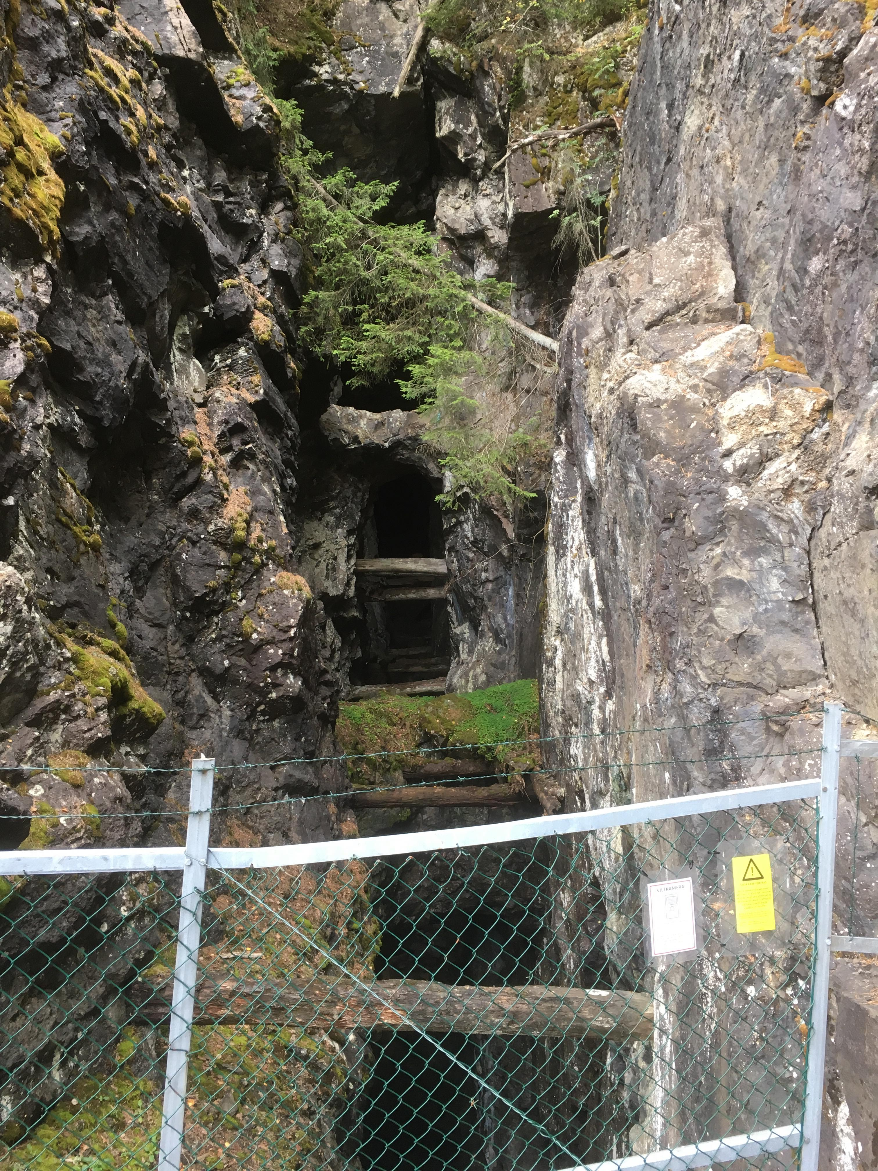 Gruvene (2018)